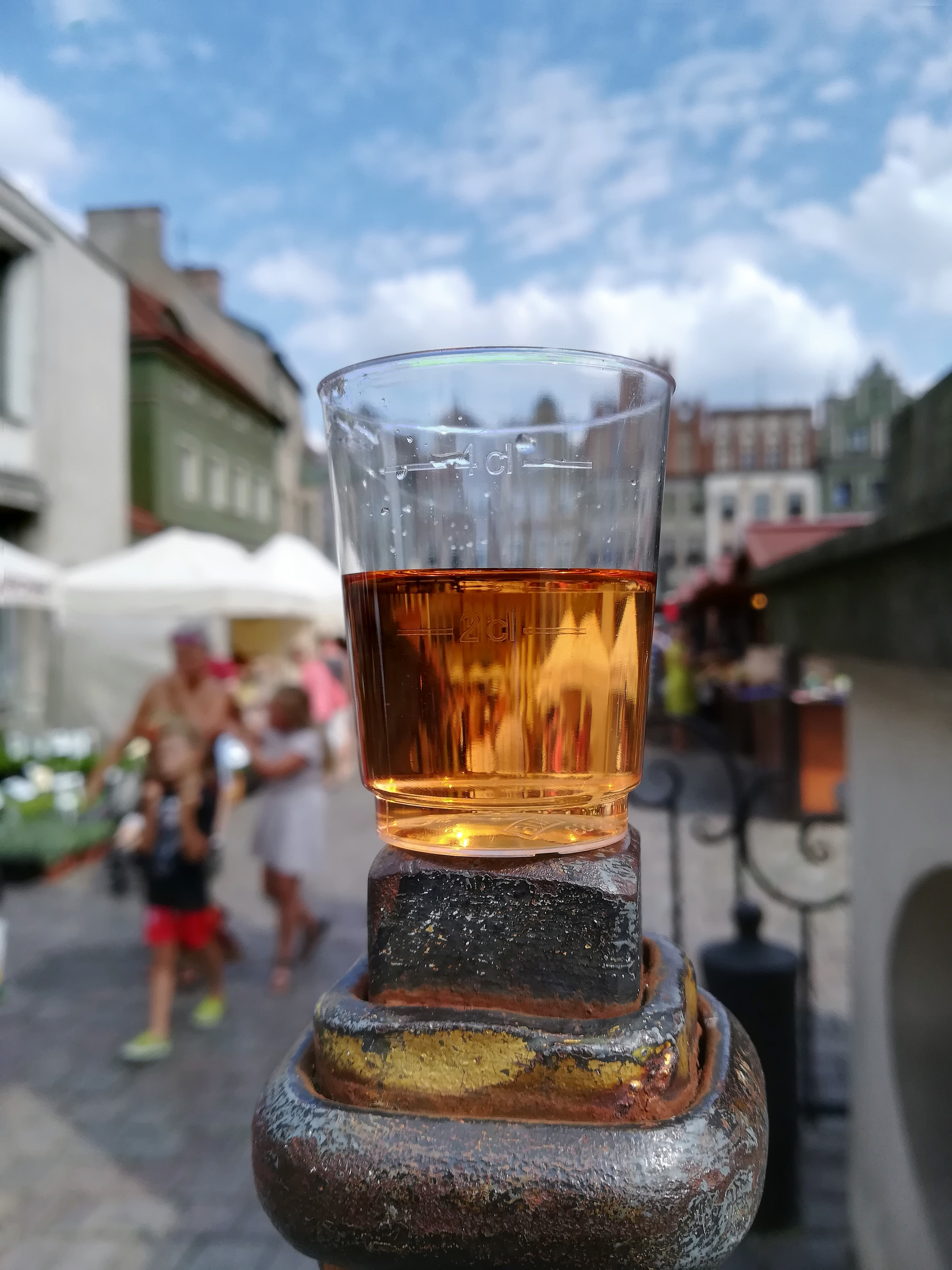 Ogólnopolski Festiwal Dobrego Smaku w Poznaniu - VIII 2018r.